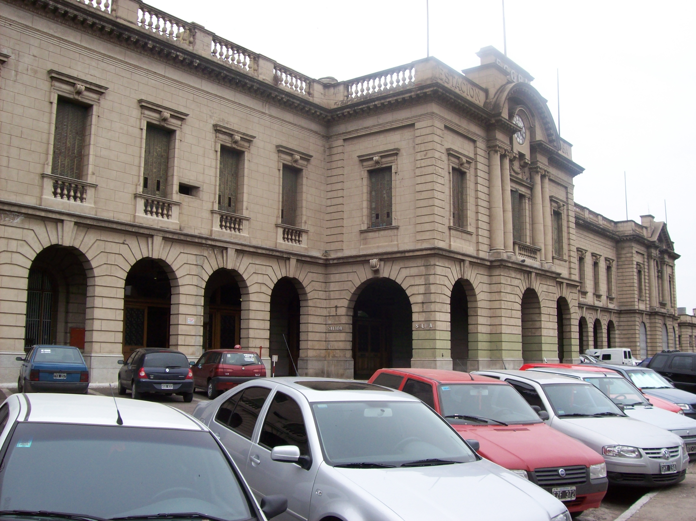 Frente del edificio de la Estación Córdoba del FCGBM, en la provincia de Córdoba, Argentina.